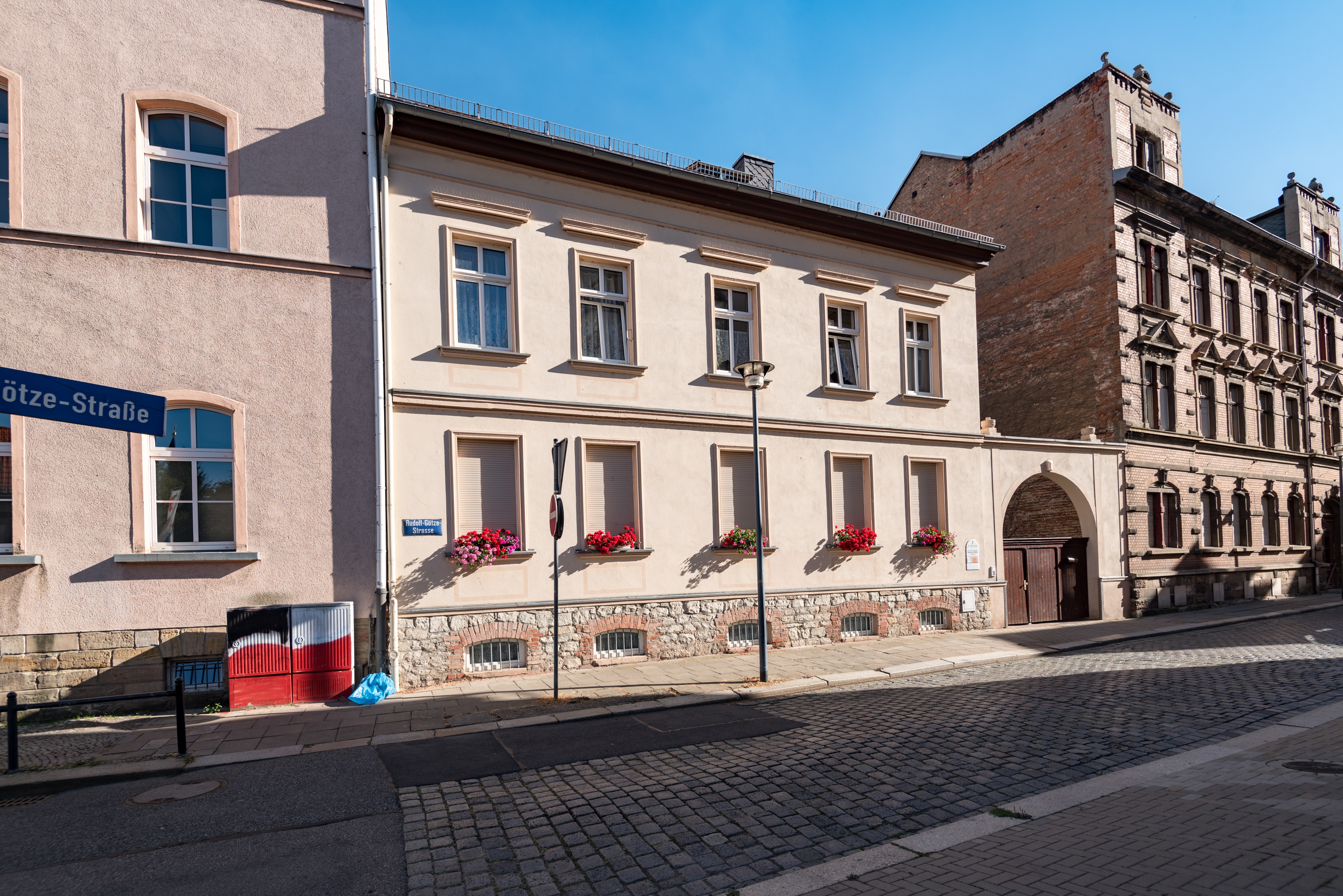 Weißenfels, Rudolf-Götze-Straße 2